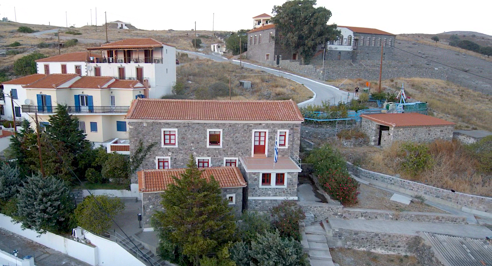 Το κτήριο στο οποίο στεγάζεται το Μουσείο, είχε χτιστεί αρχικά ως διδακτήριο - ήταν το πρώτο του νησιού. Στα χρόνια του εκτοπισμού πολιτικών εξορίστων στον 'Αη-Στράτη χρησιμοποιήθηκε ως αναρρωτήριο. Ο σεισμός του 1968 προκάλεσε σοβαρότατες ζημιές στο κτήριο με αποτέλεσμα την εγκατάλειψή του. Το 2005 άρχισαν οι εργασίες για την αναστήλωσή του από την Υπηρεσία Νεωτέρων Μνημείων και Τεχνικών ΄Εργων Β. Αιγαίου του Υπουργείου Πολιτισμού, οι οποίες ολοκληρώθηκαν τον Νοέμβριο του 2007. Τη συγκέντρωση των εκθεμάτων και την οργάνωση του Μουσείου ανέλαβε η Διεύθυνση Νεώτερης Πολιτιστικής Κληρονομιάς του Υπουργείου Πολιτισμού. This is a photography of Natura 2000 protected area with ID GR4110002